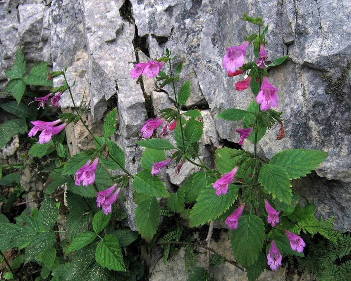 Velecvetni čober na Snežniku.